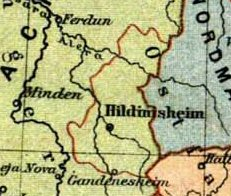 Die Karte zeigt die Grenzen der kirchlichen Diözese Hildesheim seit ihrer Gründung 815; sie zeigt nicht die sehr anders verlaufenden und wechselnden Grenzen des Fürstbistums Hildesheim.